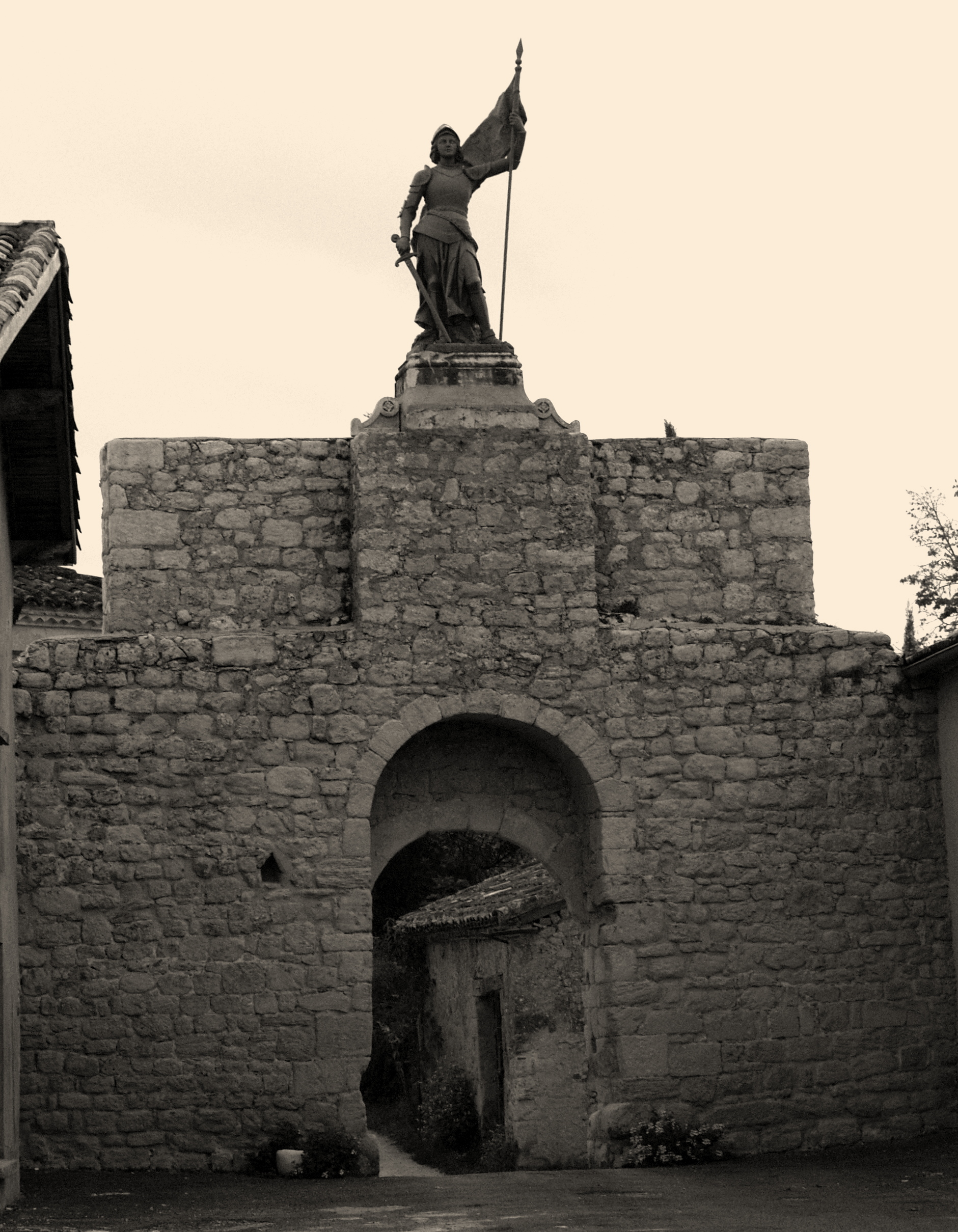 remparts datant fin 13eme siècle .